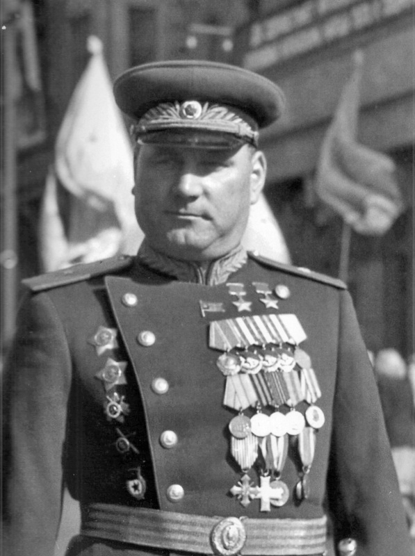 Генерал-майор И.И. Якубовский на улице Москвы